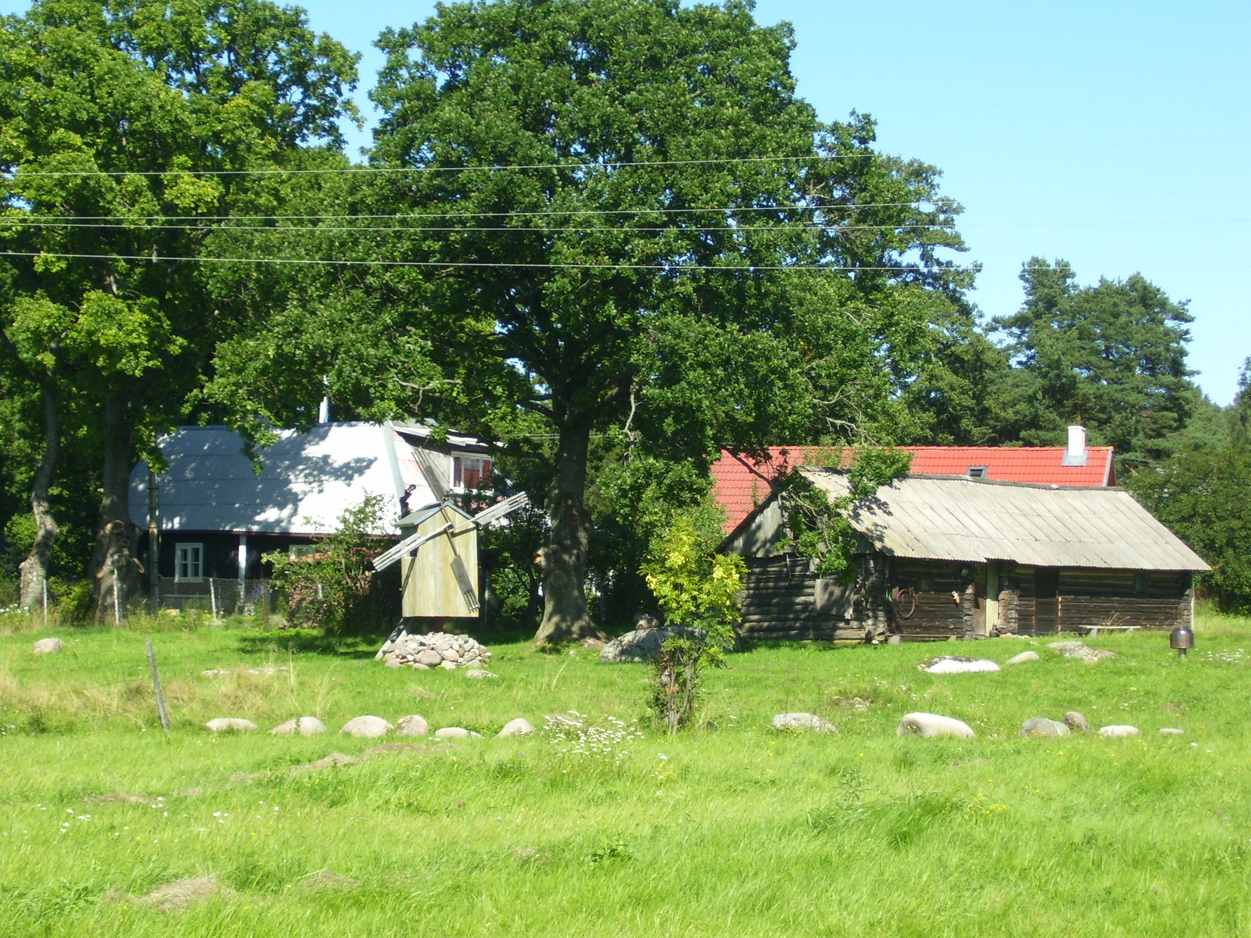 Kiiu-Aabla (Kuusalu vald).